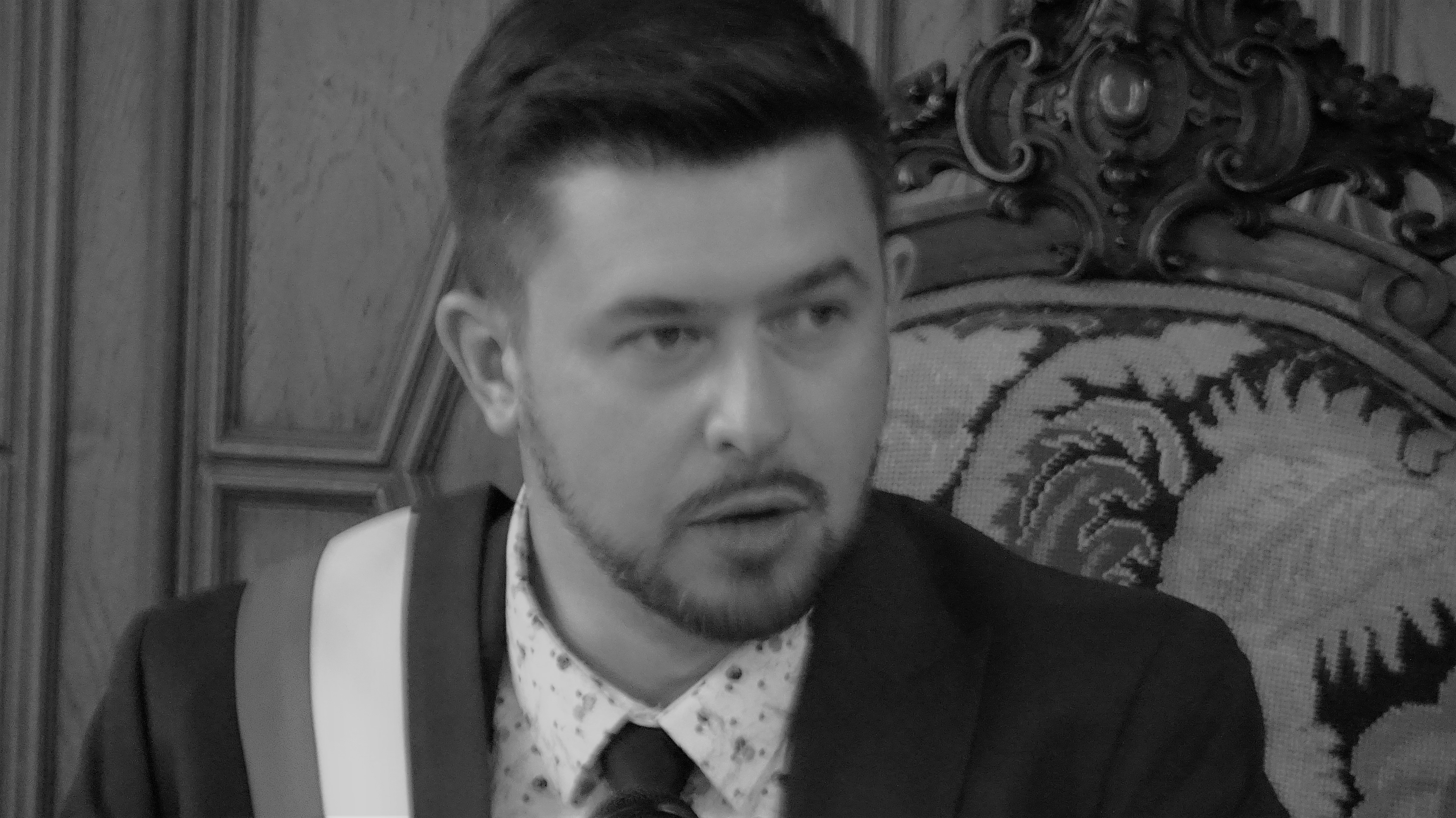 Xavier Bartoszek élu à 34 ans plus jeune maire du Douaisis le samedi 5 juillet 2020 en salle des conseils.